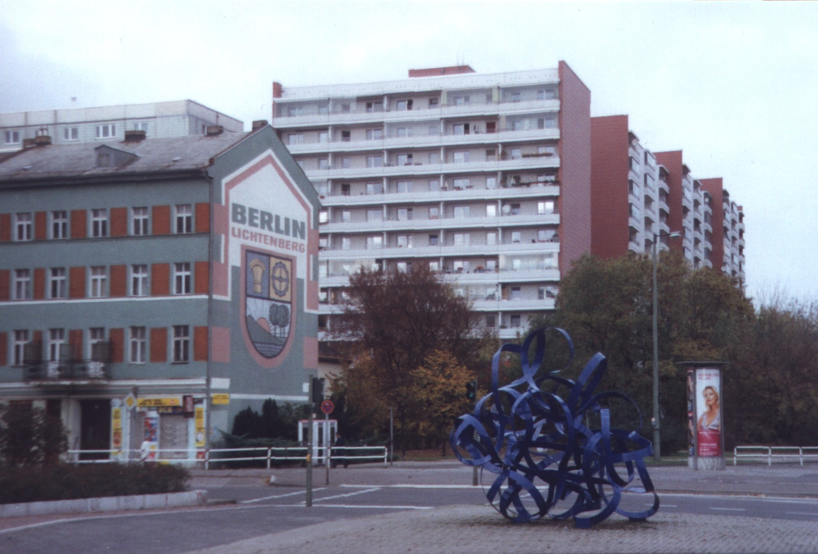 Straße Alt-Friedrichsfelde 87, Putzbild Lichtenberger Wappen